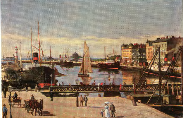 Hafen von Malmö, Ölgemälde